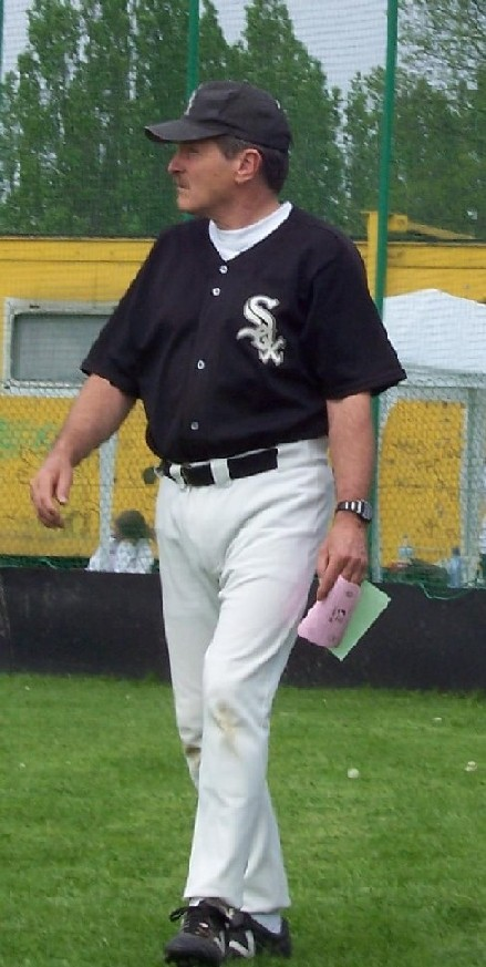 Eric "pa'ke" Crauwels. Trainer/coach Limburg White Sox